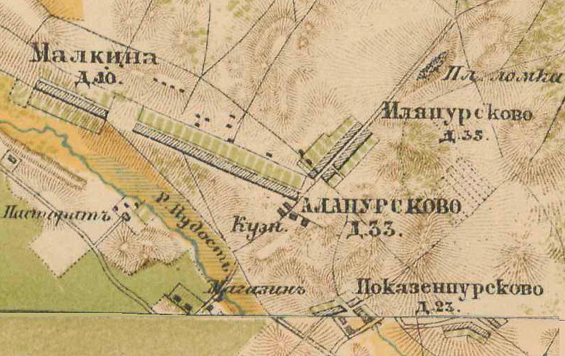 Деревни Алапуская, Юля-Пурская и Покизен-Пурская на карте 1885 года.